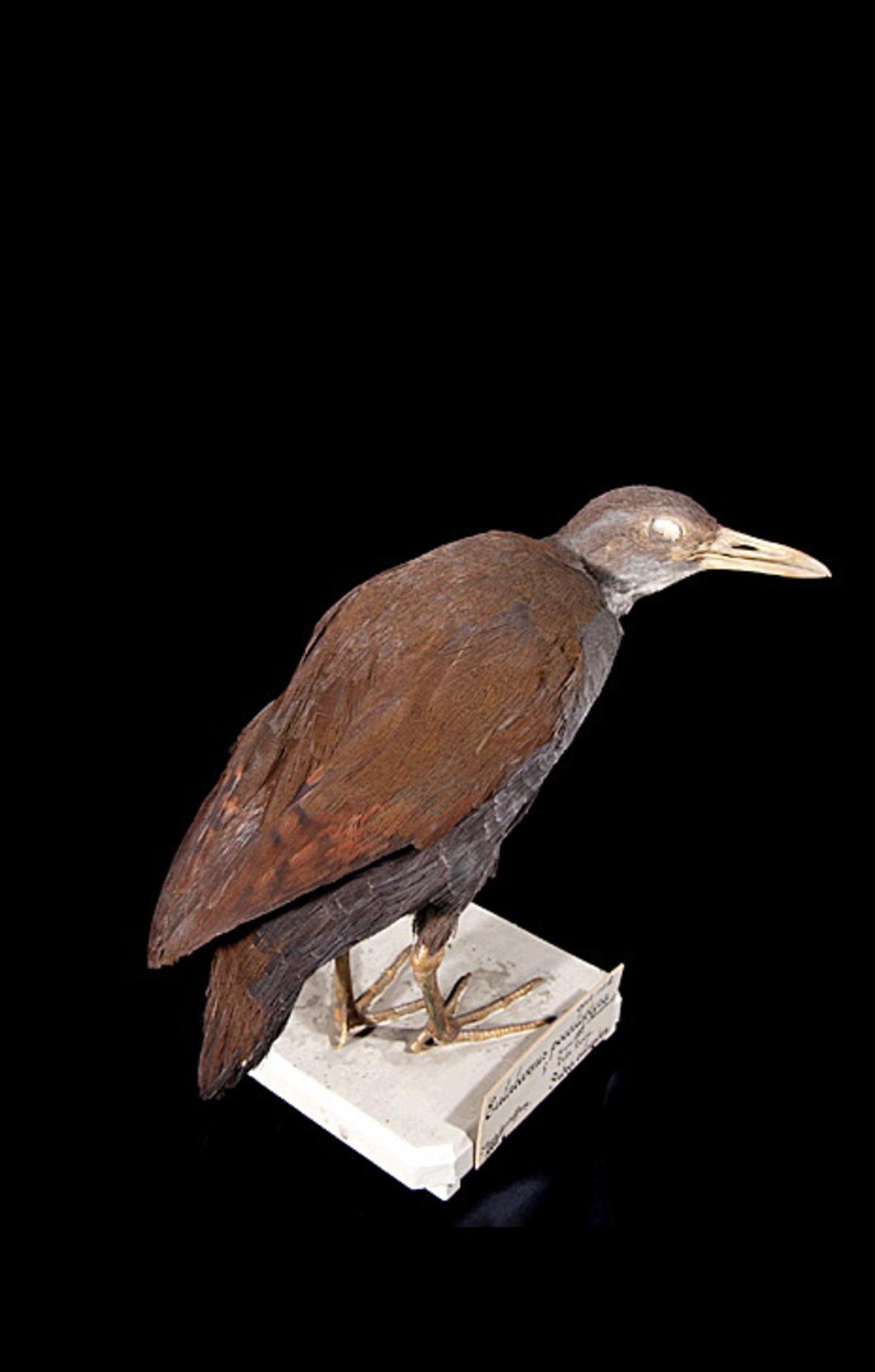 Nesoclopeus poecilopterus poecilopterus